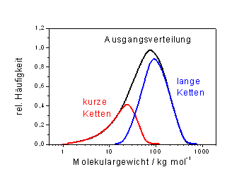 Molekulargewichtsverteilungen eines Polymeren und zweier daraus gewonnen Fraktionen